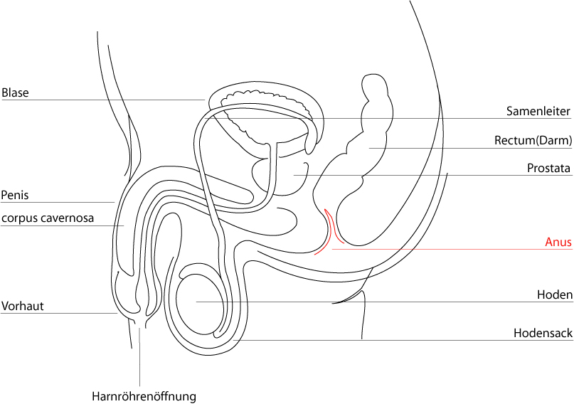 Anus